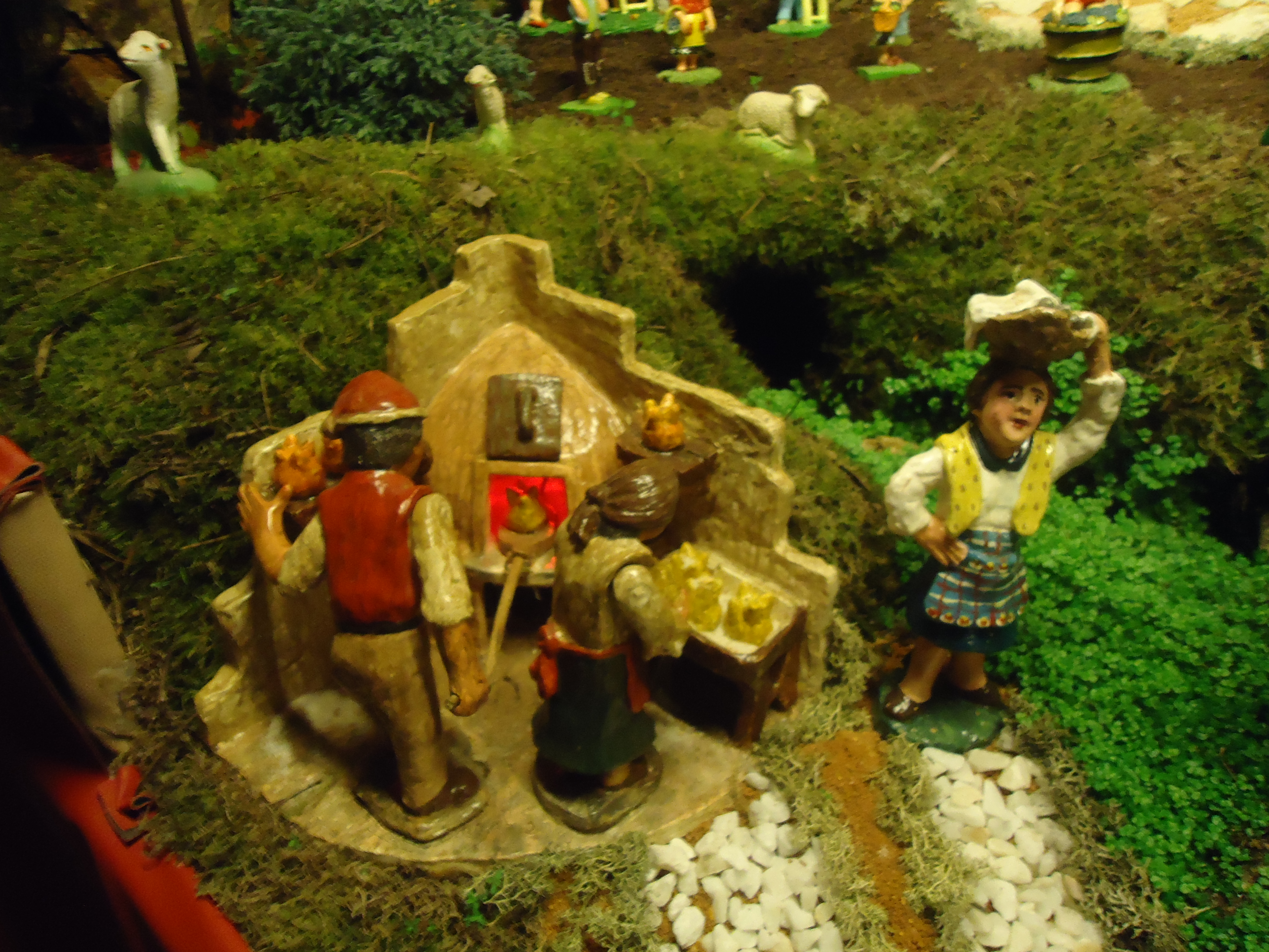 Presépio Cavalinho, São Paio de Oleiros, Portugal: Natal de 2015. Confecção de Fogaças (Festa das Fogaceiras, Santa Maria da Feira).